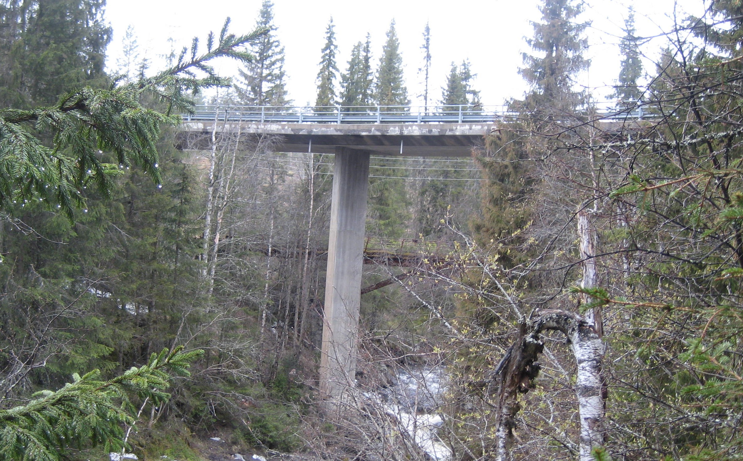 Nye Kjøljubrua